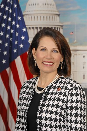 Michele Bachmann